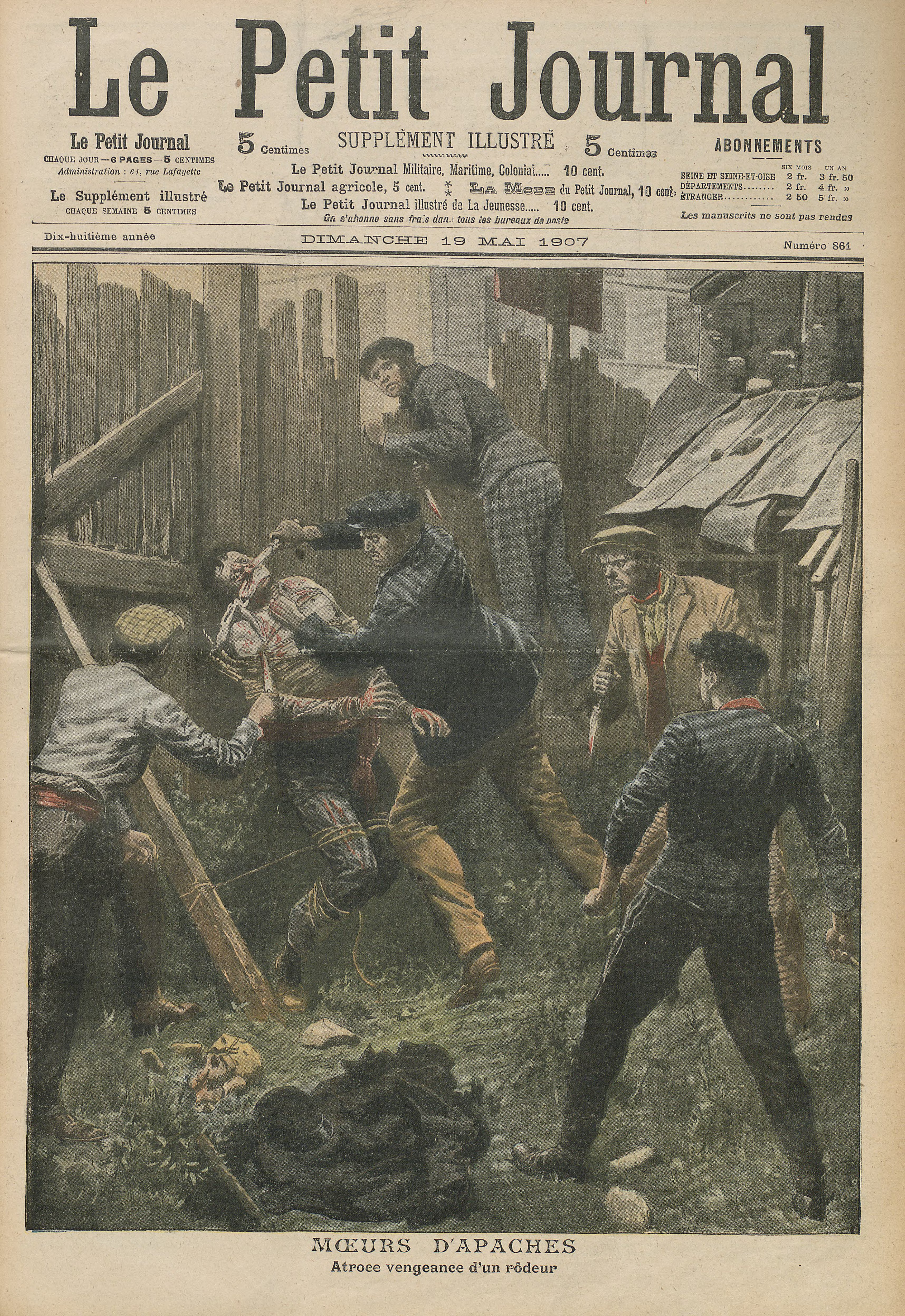 Atroce vengeance d' un rôdeur Français cadien: Atroce vengeance d' un rôdeur